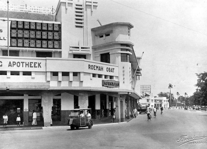 Repronegatief. Het Simpangplein met op een hoek een gebouw met de fotostudio van O. Kurkdjian & Co, de Simpang Apotheek en Roemah Obat, Soerabaia